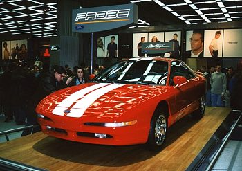 1997 Ford Probe GTS